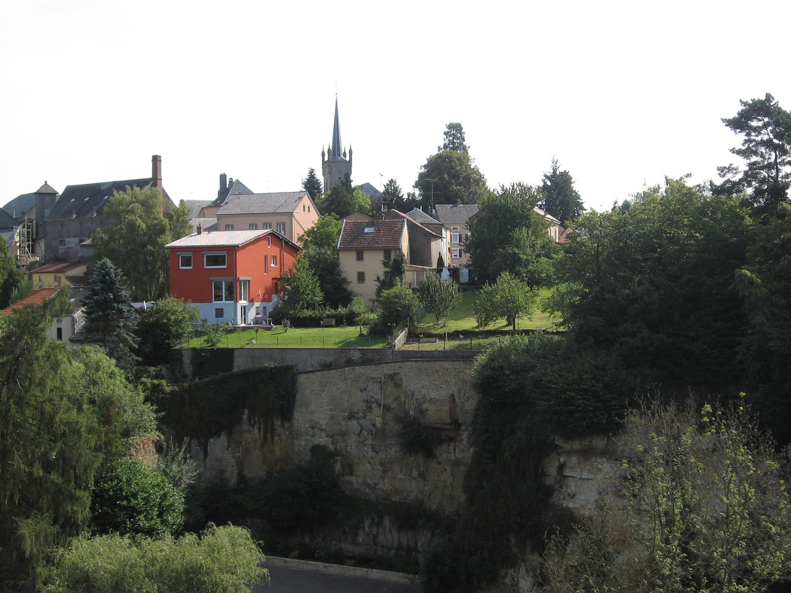 Le village de Beaufort (Luxembourg)